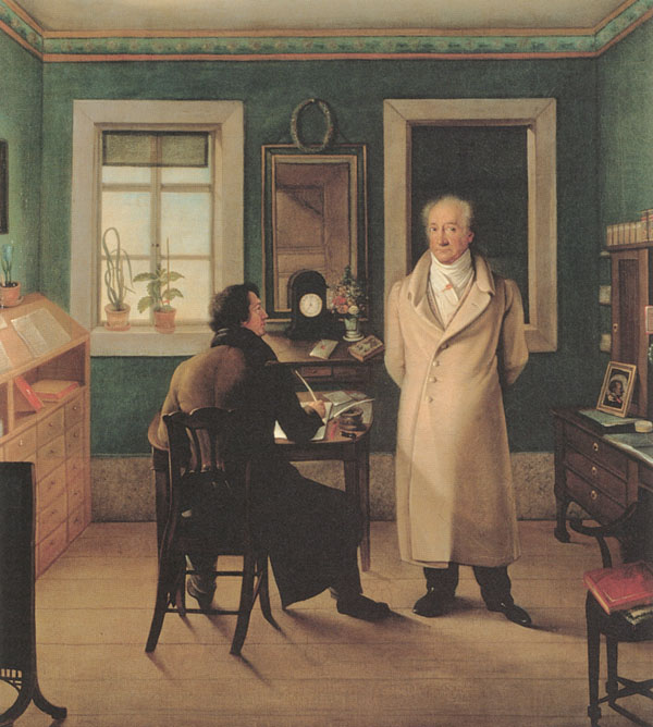 Johann Joseph Schmeller: Goethe seinem Schreiber John diktierend 1831. (In der Herzogin Anna Amalia Bibliothek, Weimar)